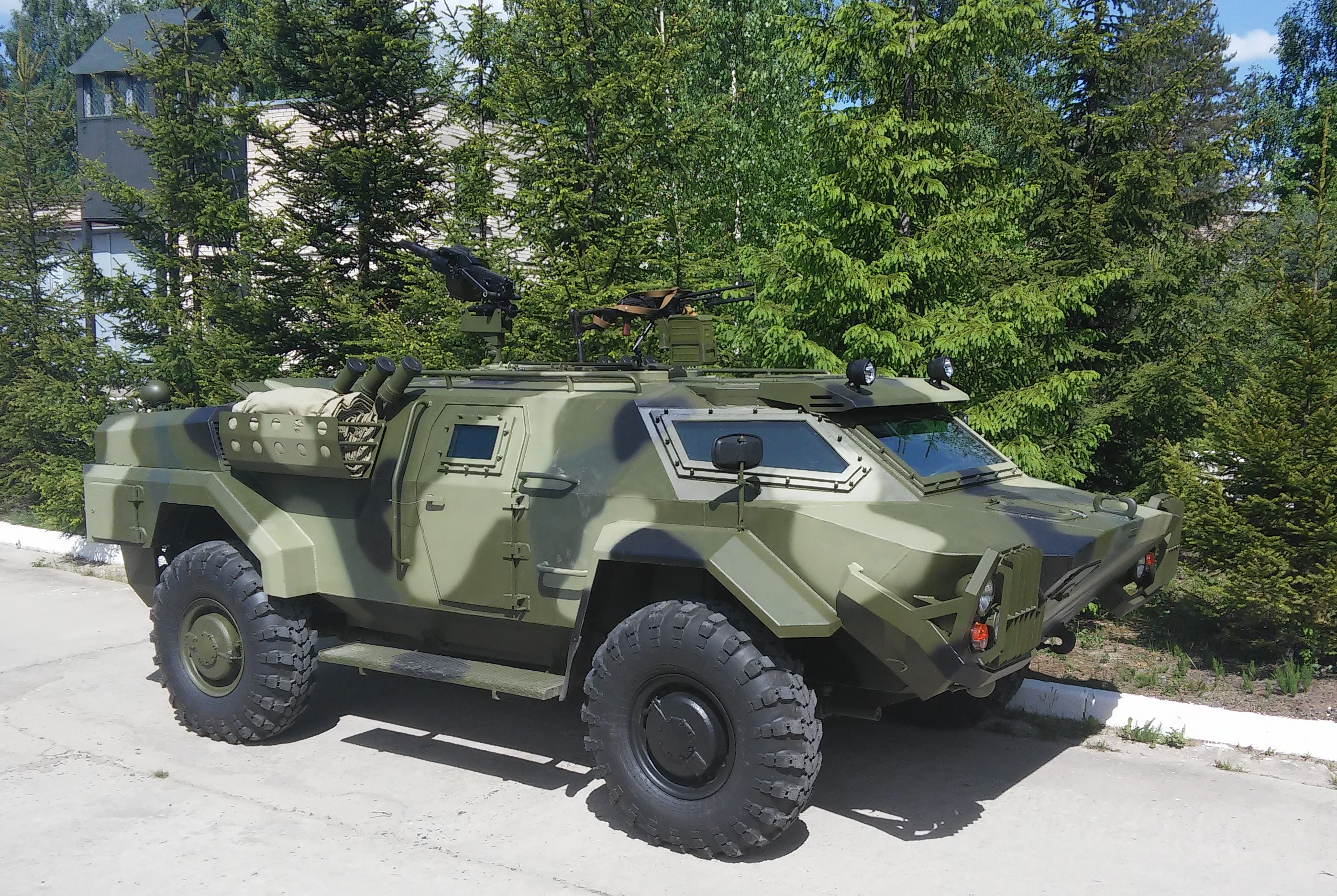 Один из предсерийных экземпляров "Каймана"